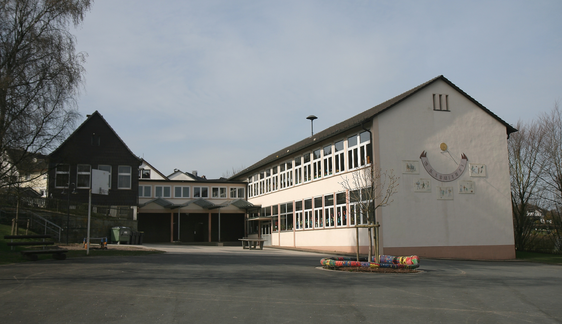 Städtische Gemeinschaftsgrundschule in [Balve]-Langenholthausen.